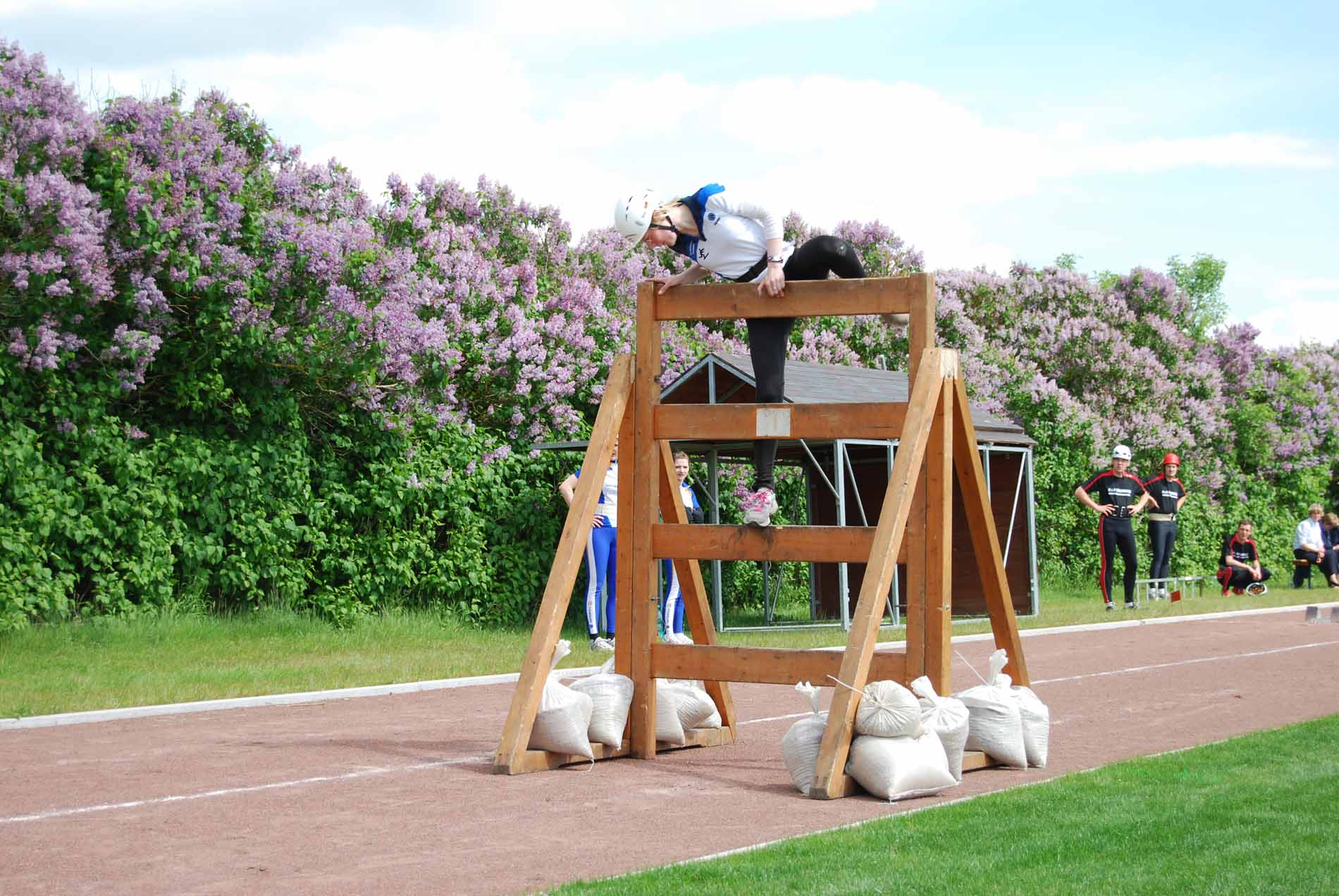 S. Schmecht beim Überwinden der 2 m hohen Leiterwand